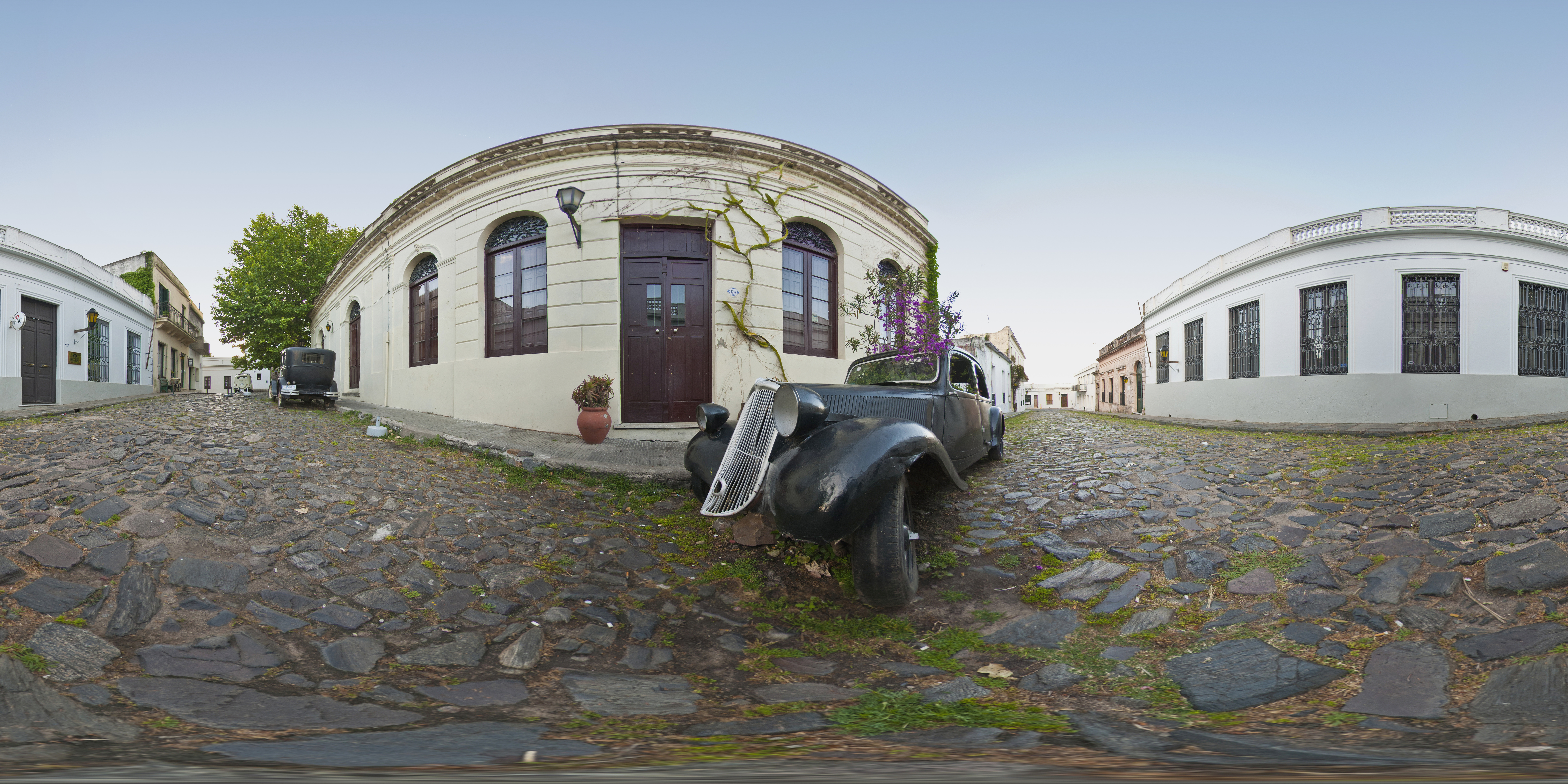 En el casco antiguo de Colonia del Sacramento el visitante se sorprenderá con autos antiguos que en lugar de convertirse en chatarra vieja y olvidada, sirven para darle un toque especial al lugar. Ahora albergan flores. Son ideas que generan interés visual y estético en los turistas, que no pueden pasar desapercibidos por la curiosidad de mirar dentro del auto. El casco antiguo de Colonia del Sacramento hasta hace unos años estaba en total abandono, pero en 1968 empezó la reconstrucción, que culminó en 1972. La Unesco nombró este casco antiguo como Patrimonio de la Humanidad en 1995. Ha sido protagonista de importantes películas, gracias a la fusión de la arquitectura española y portuguesa. Definitivamente, Colonia del Sacramento, un paseo muy interesante, a pocas horas en buque bus, desde Buenos Aires y a dos horas de Montevideo, en bus.